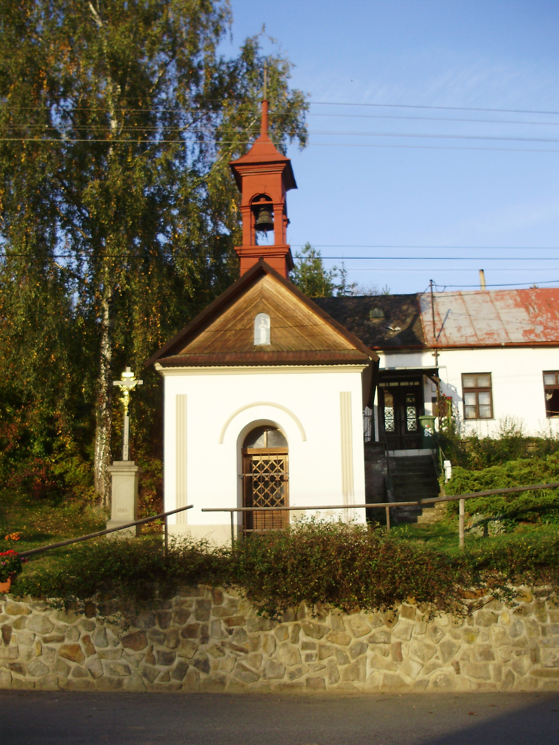 Kaple v obci Olšany v okrese Vyškov.